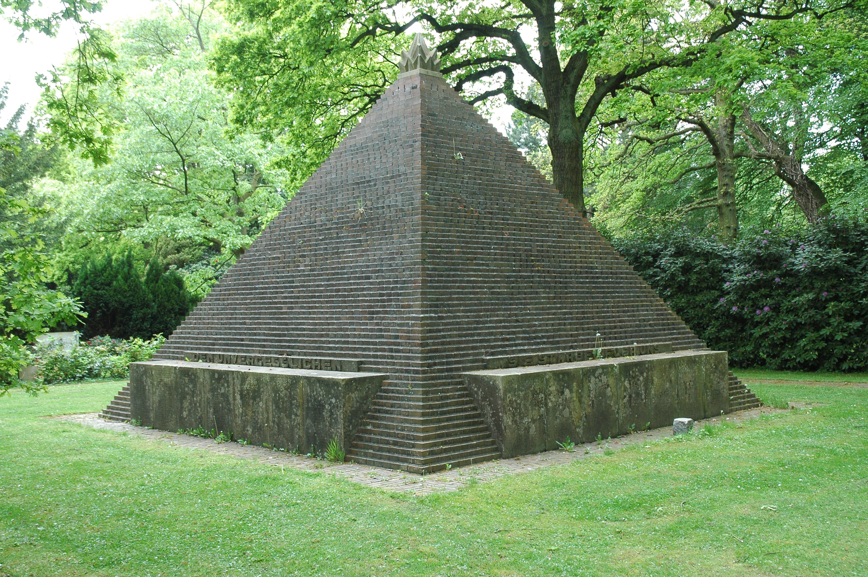 Kriegerehrung der Stadt Bremerhaven auf dem Friedhof Wulsdorf, Klinkerpyramide nach Entwurf von Eeg & Runge